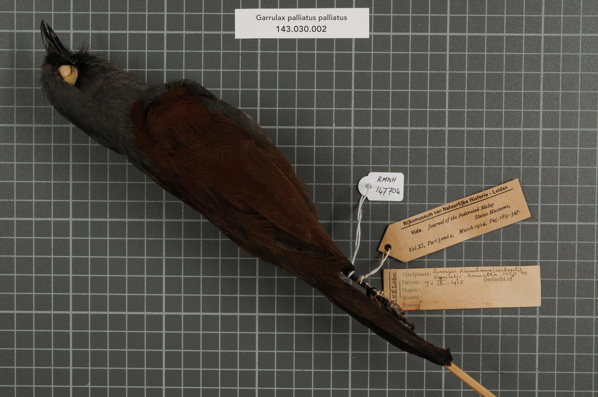 Garrulax palliatus palliatus (Bonaparte, 1850)